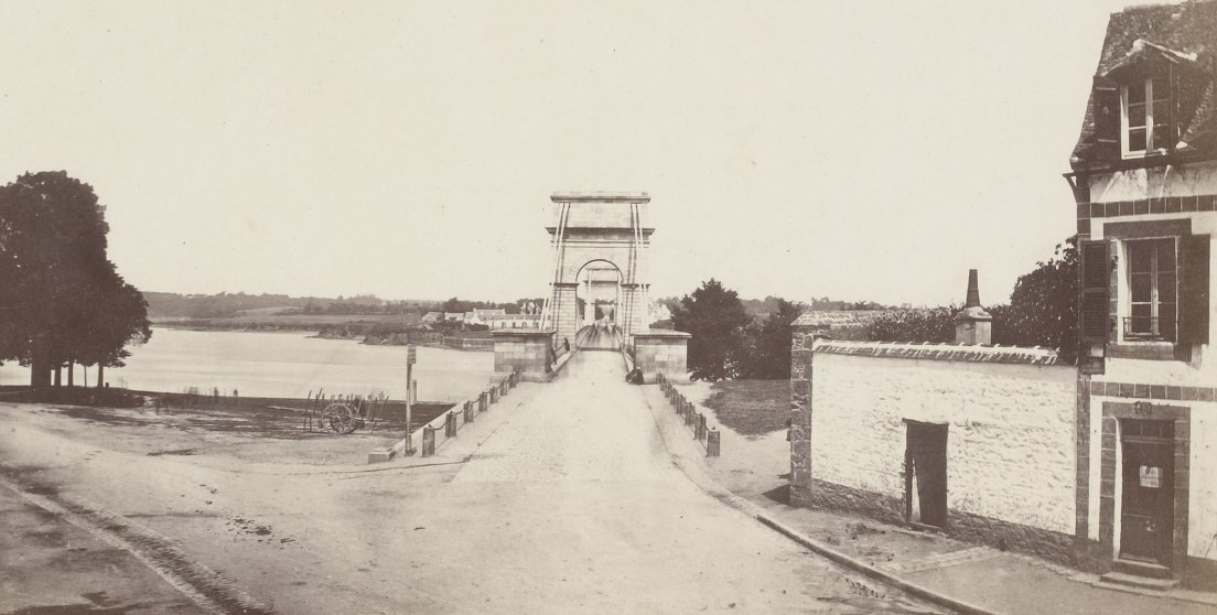 Lorient en 1866, Pont de Saint-Christophe, pont dit en fils de fer, en direction de Lanester